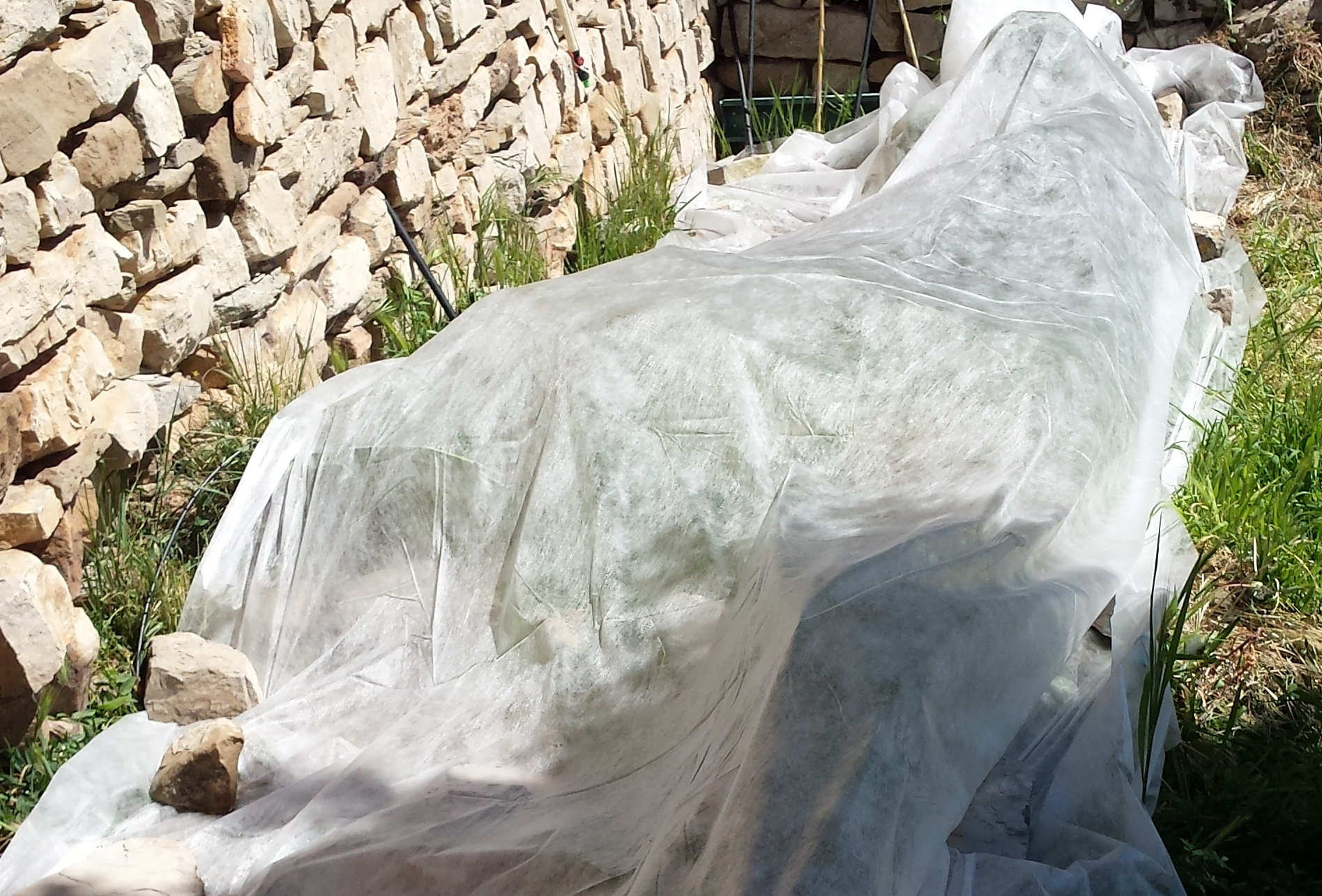 Manta tèrmica sobre carbasseres a Castelltallat, Bages